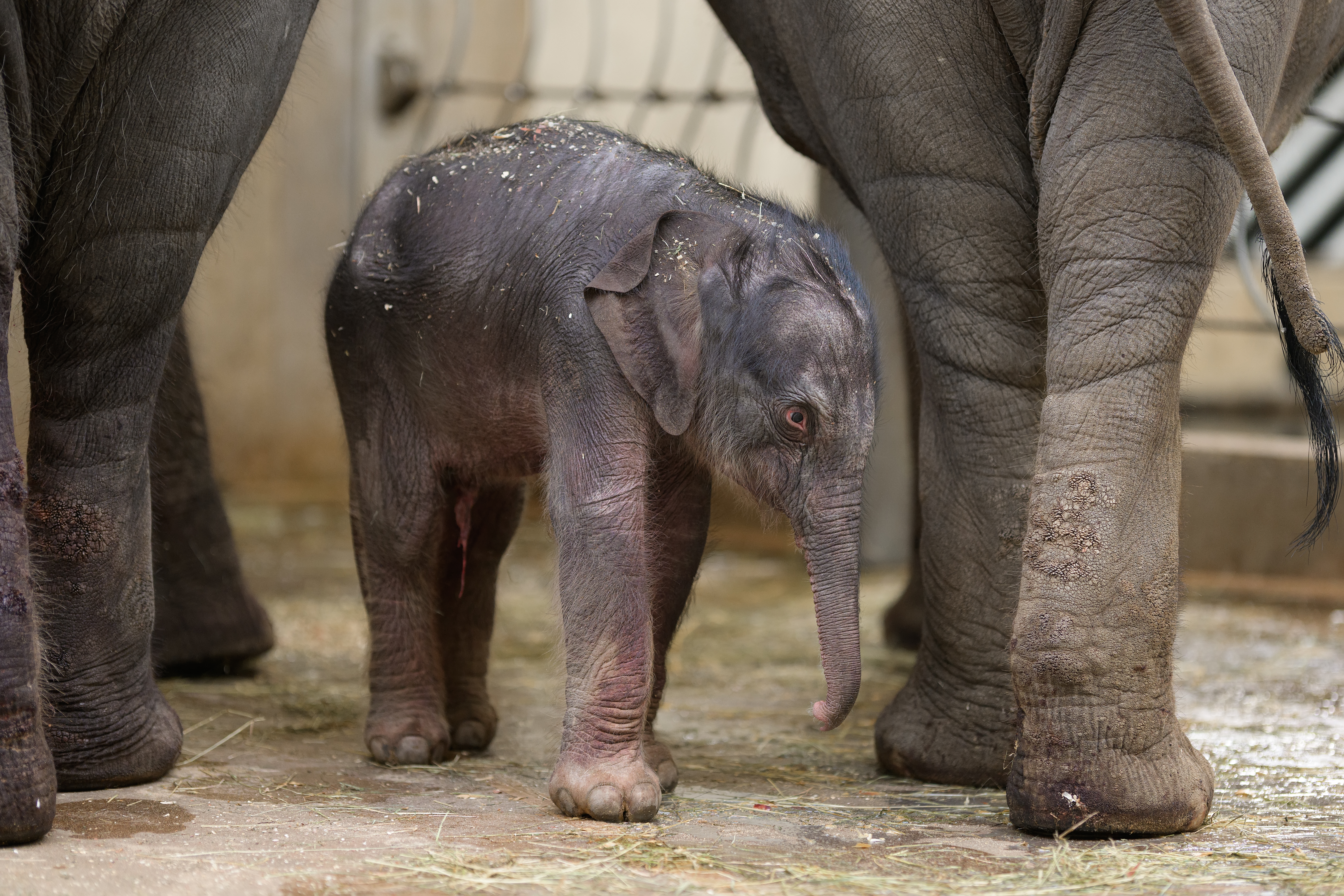 samička slona indického narozená v Zoo Praha 27. 3. 2020, foto v den narození